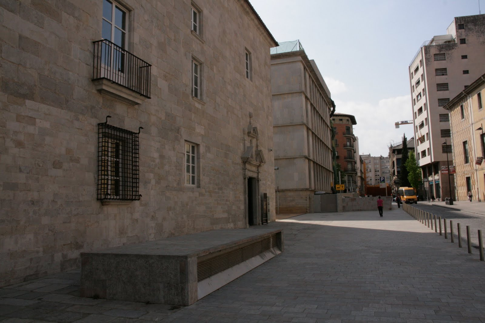 Exposició Anatomia d'un quadre, al voltant de l'obra El Gran dia de Girona al Museu d'Art de Girona